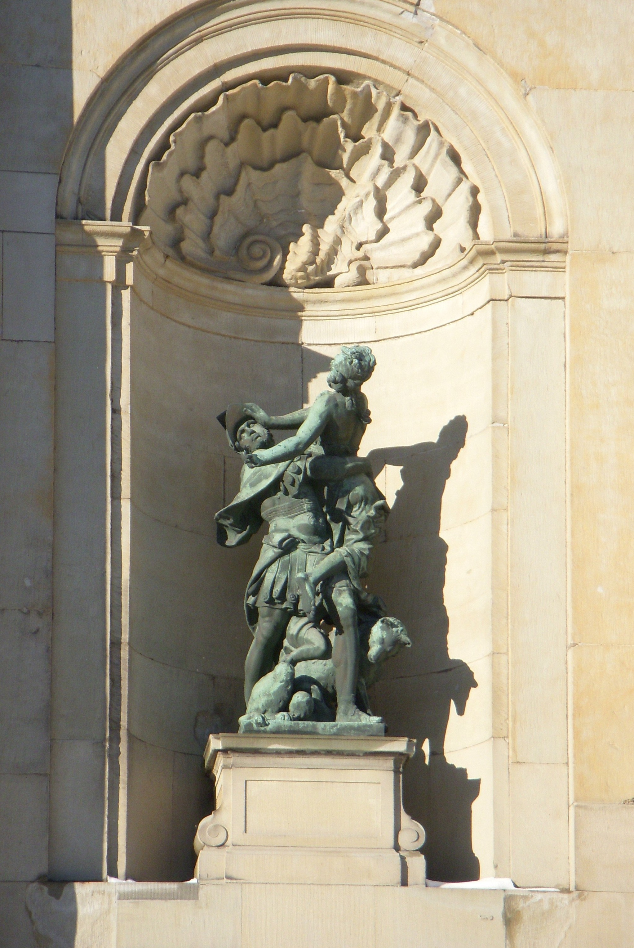 Skulptur på Stockholms slott, sydfasad